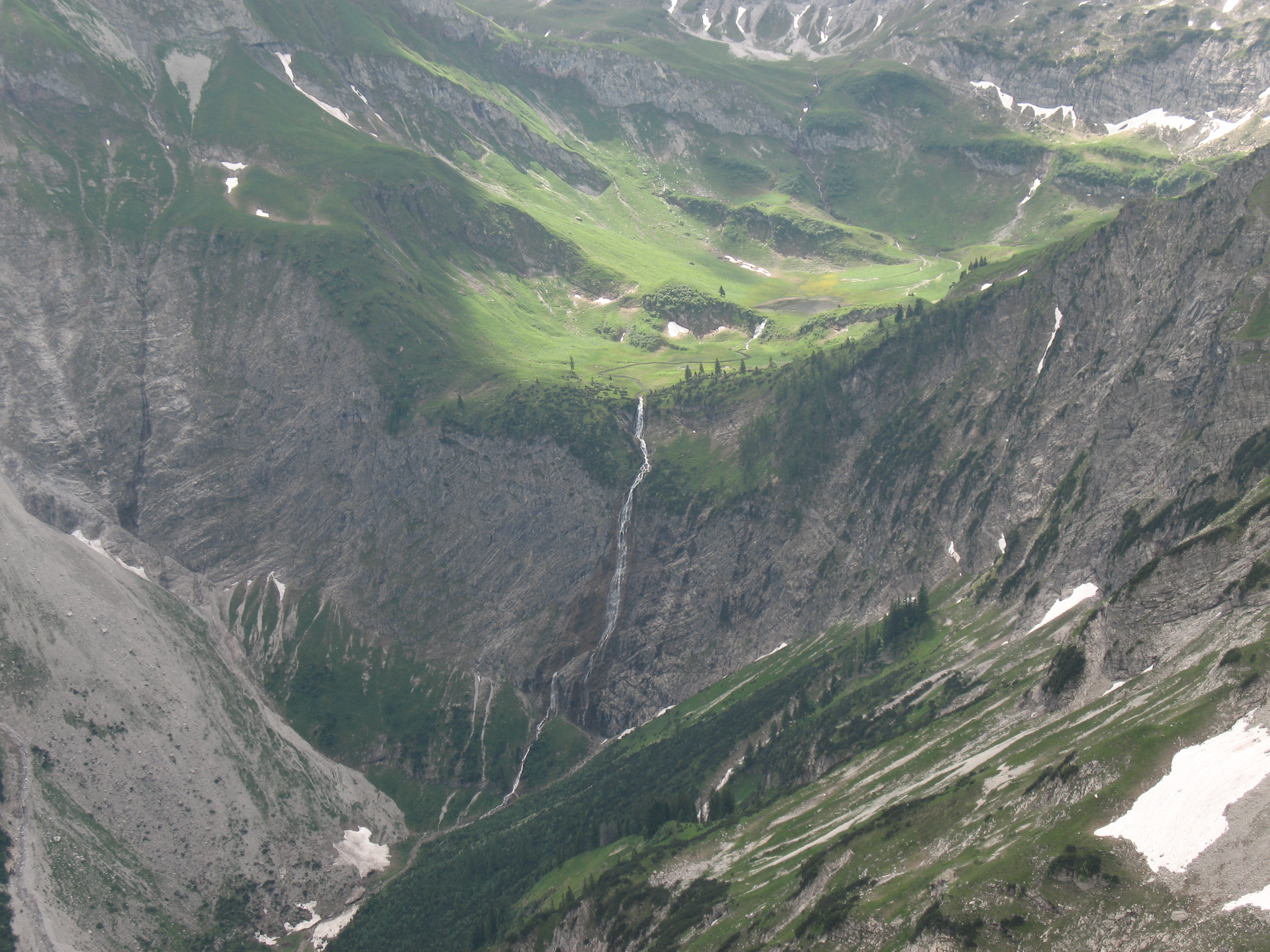 Blick vom Aufstieg zum Rauhhorn nach Südosten auf den Bärgacht-Wasserfall und den Alplsee (1600 m) im hinteren Vilsalptal.